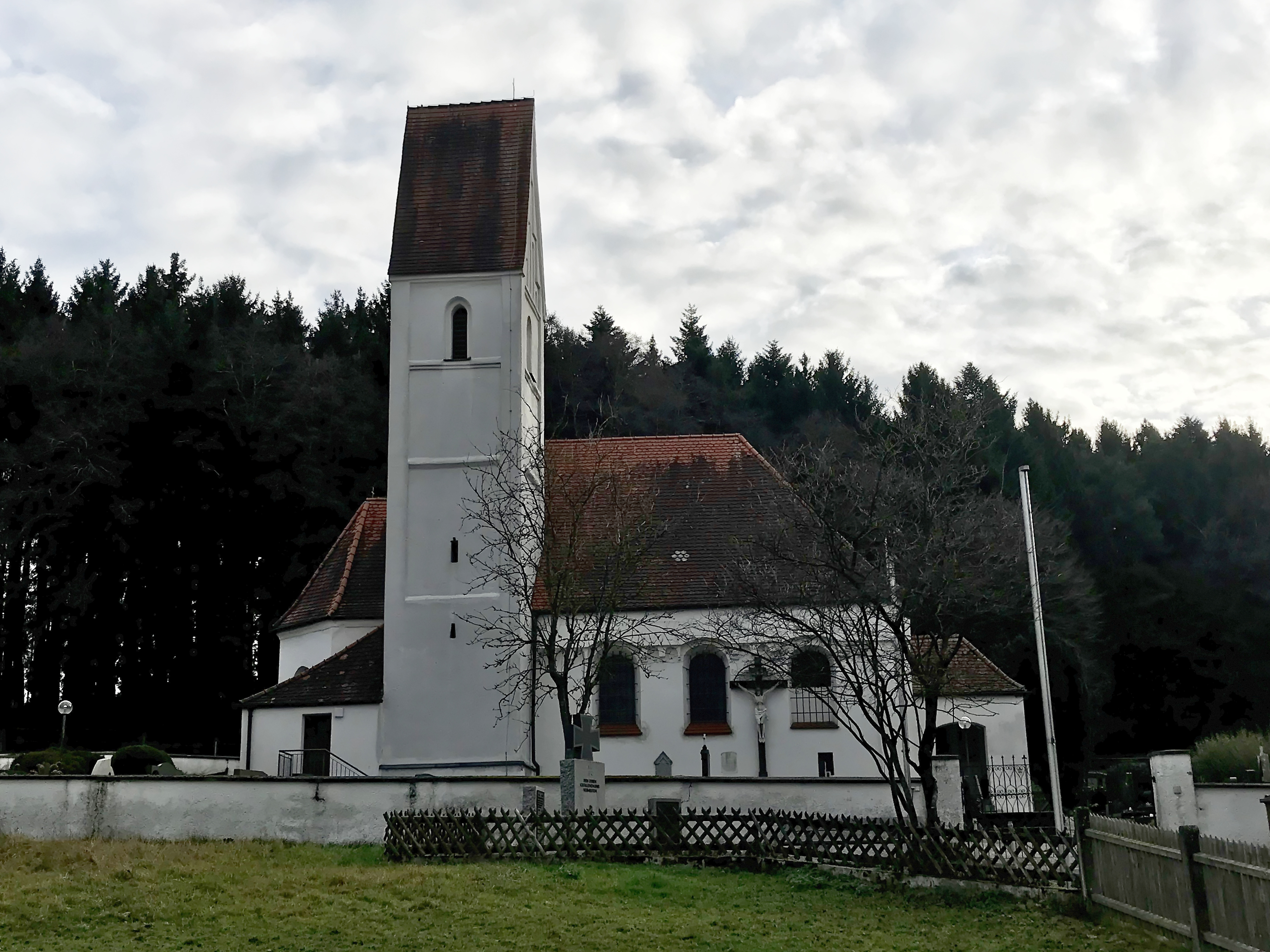 Kirche St. Kastulus in Unterschönbach bei Kühbach im Landkreis Aichach-Friedberg